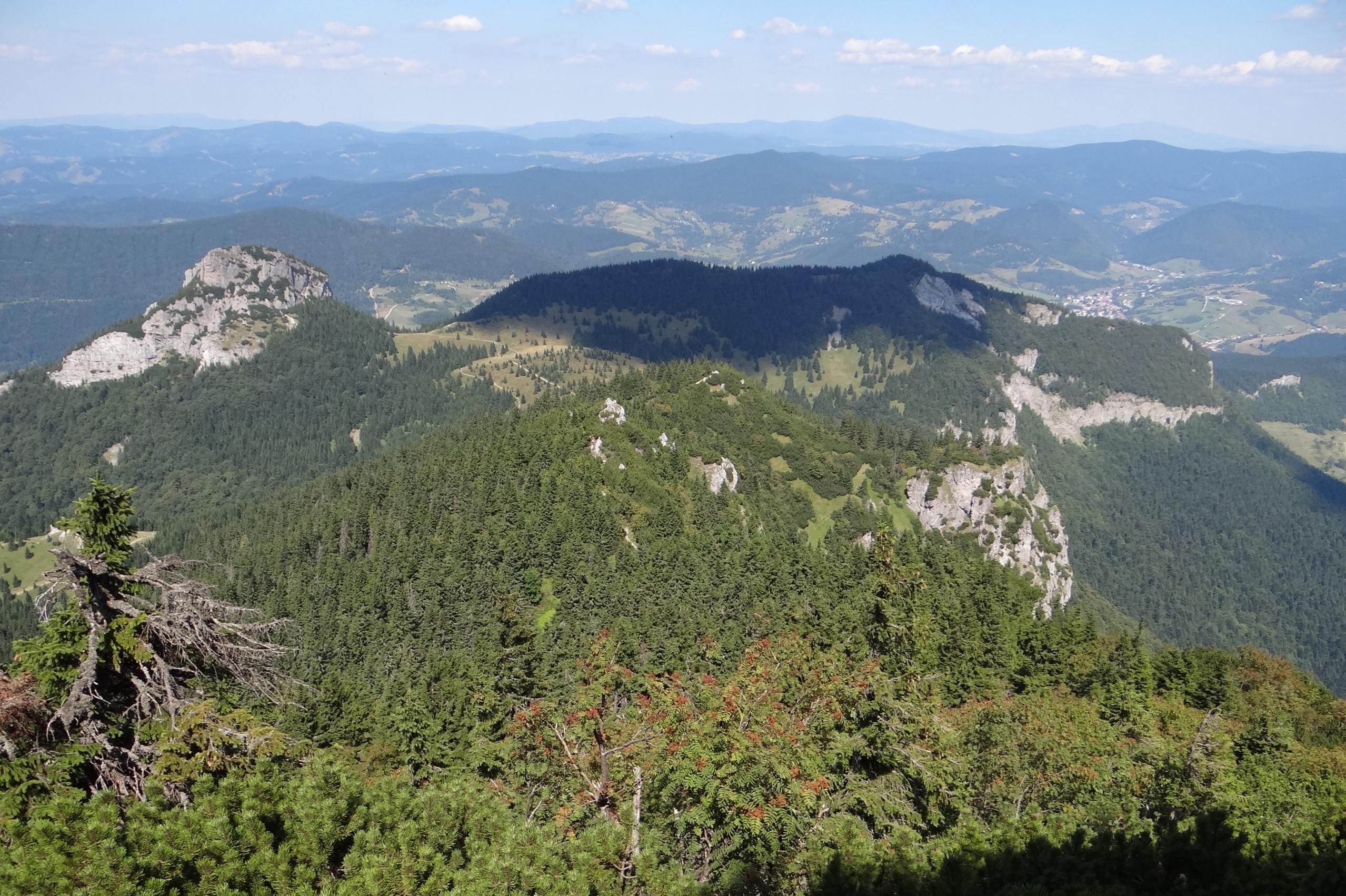 Malý Rozsutec, Zákres, Biele Steny